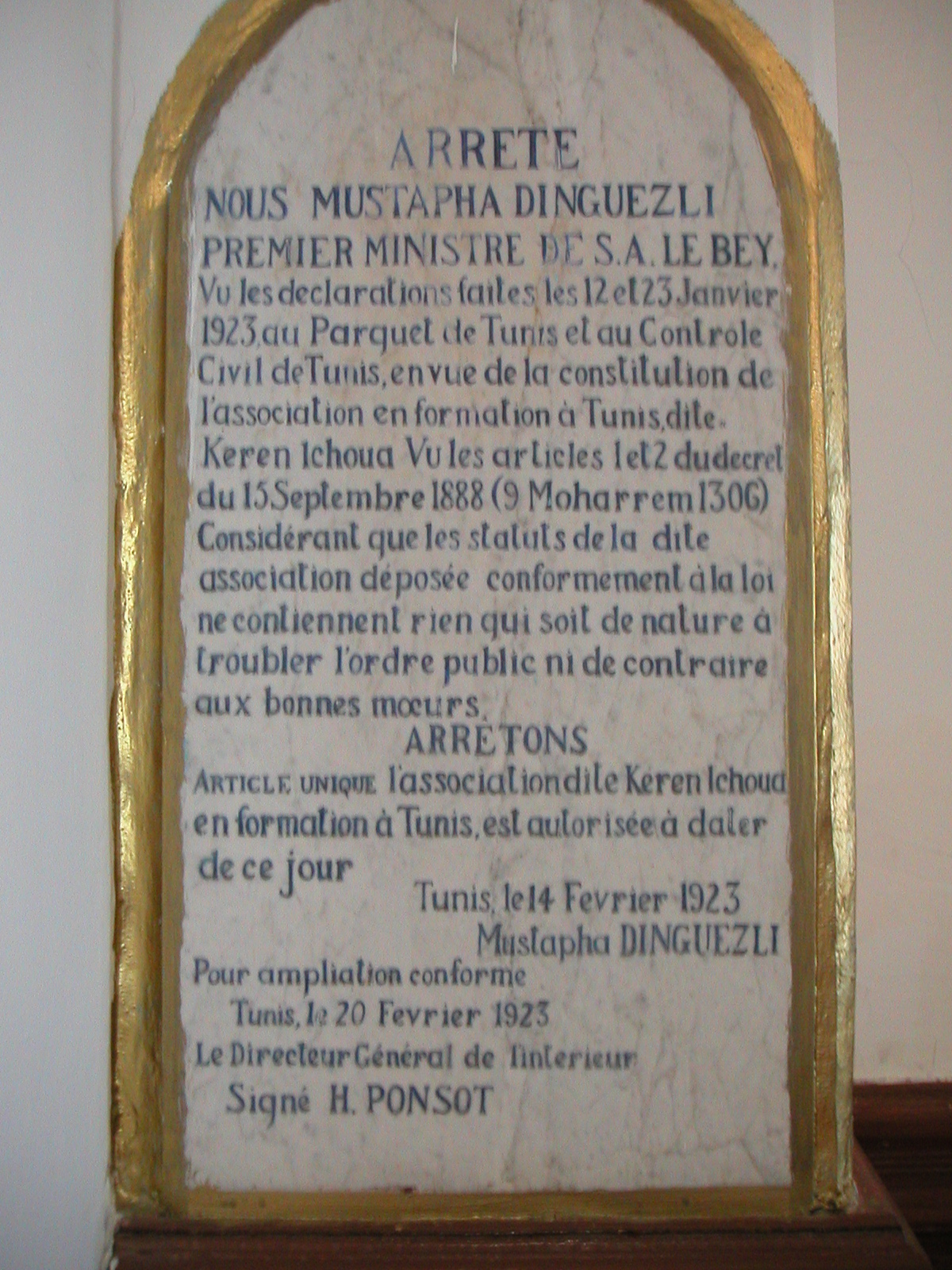 Arrêté autorisant l'association Keren Yechoua de La Marsa